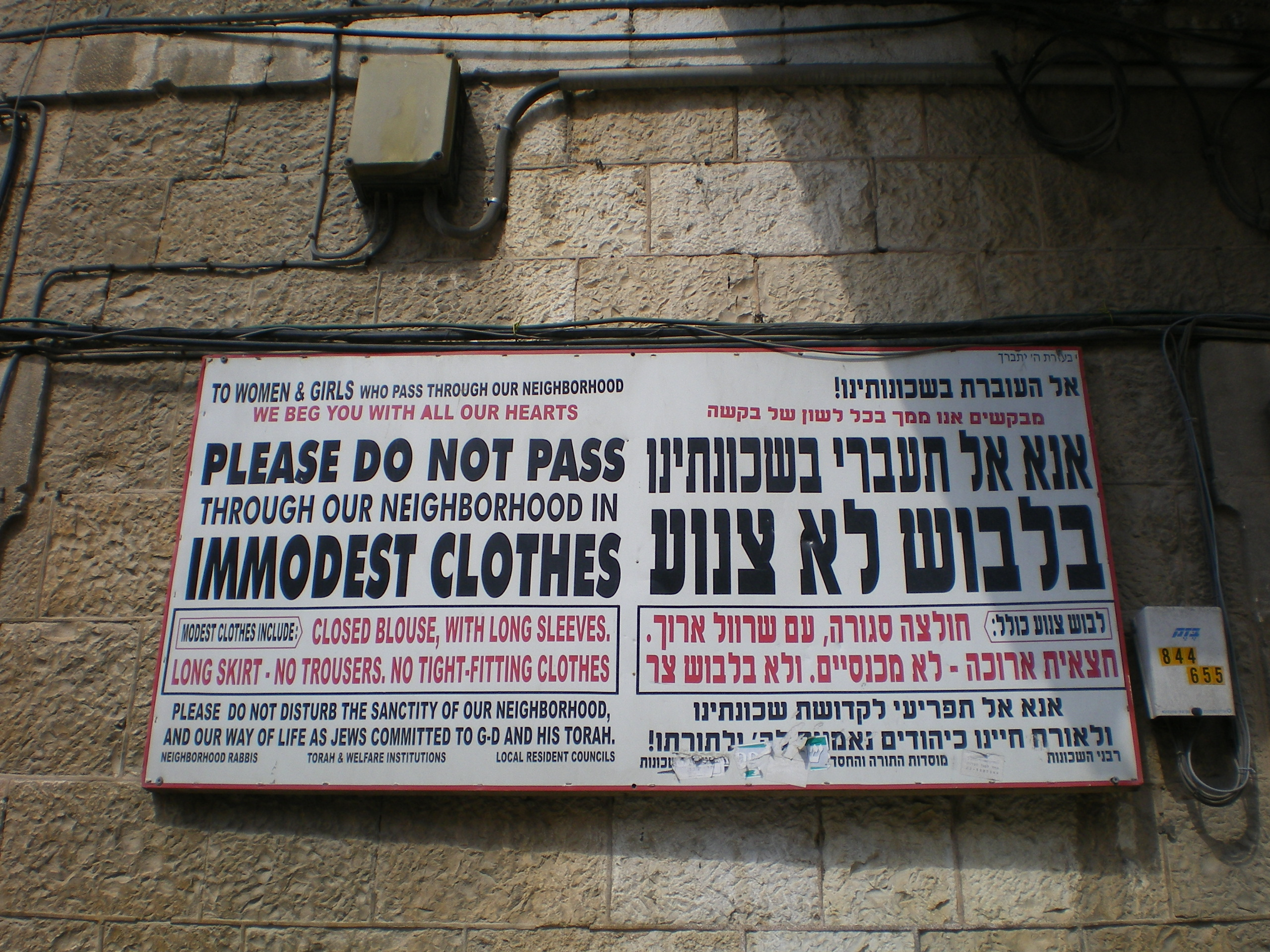 panneau d'avertissement à l'entrée du quartier de Mea Shearim